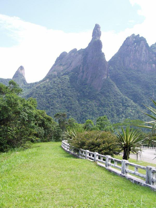 Formação rochosa conhecida como Dedo de Deus, localizada na Serra dos Órgãos é o cartão postal da cidade fluminense de Teresópolis.